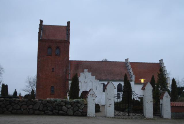 Ørting Kirke / Oerting Church, Jutland, Denmark